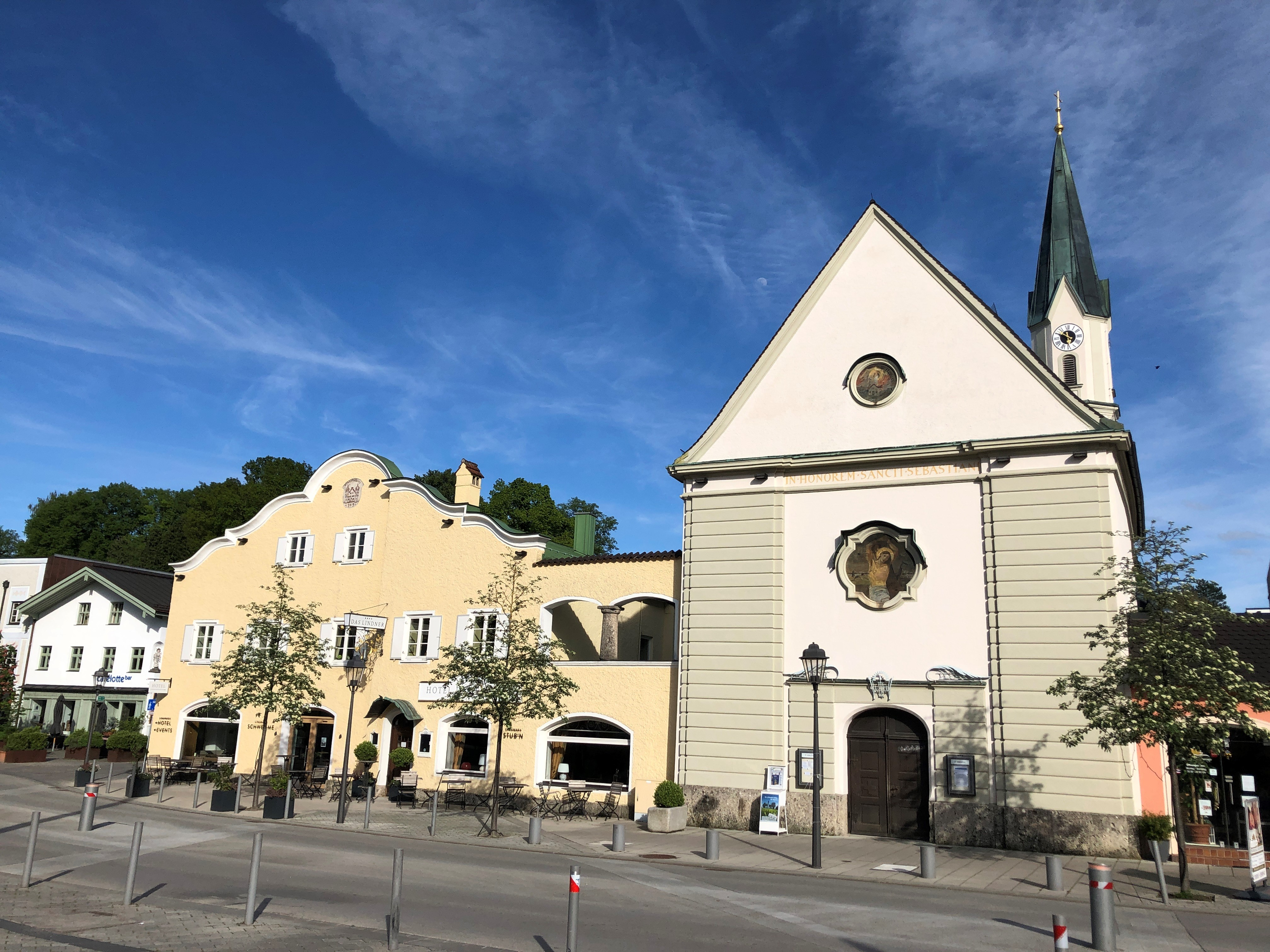 Blickrichtung Nordost vom Marienplatz in Bad Aibling.